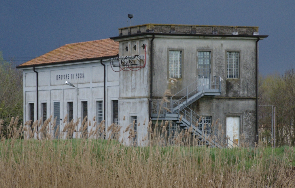 Idrovora presente a San Donà di Piave (VE) in località Fossà.